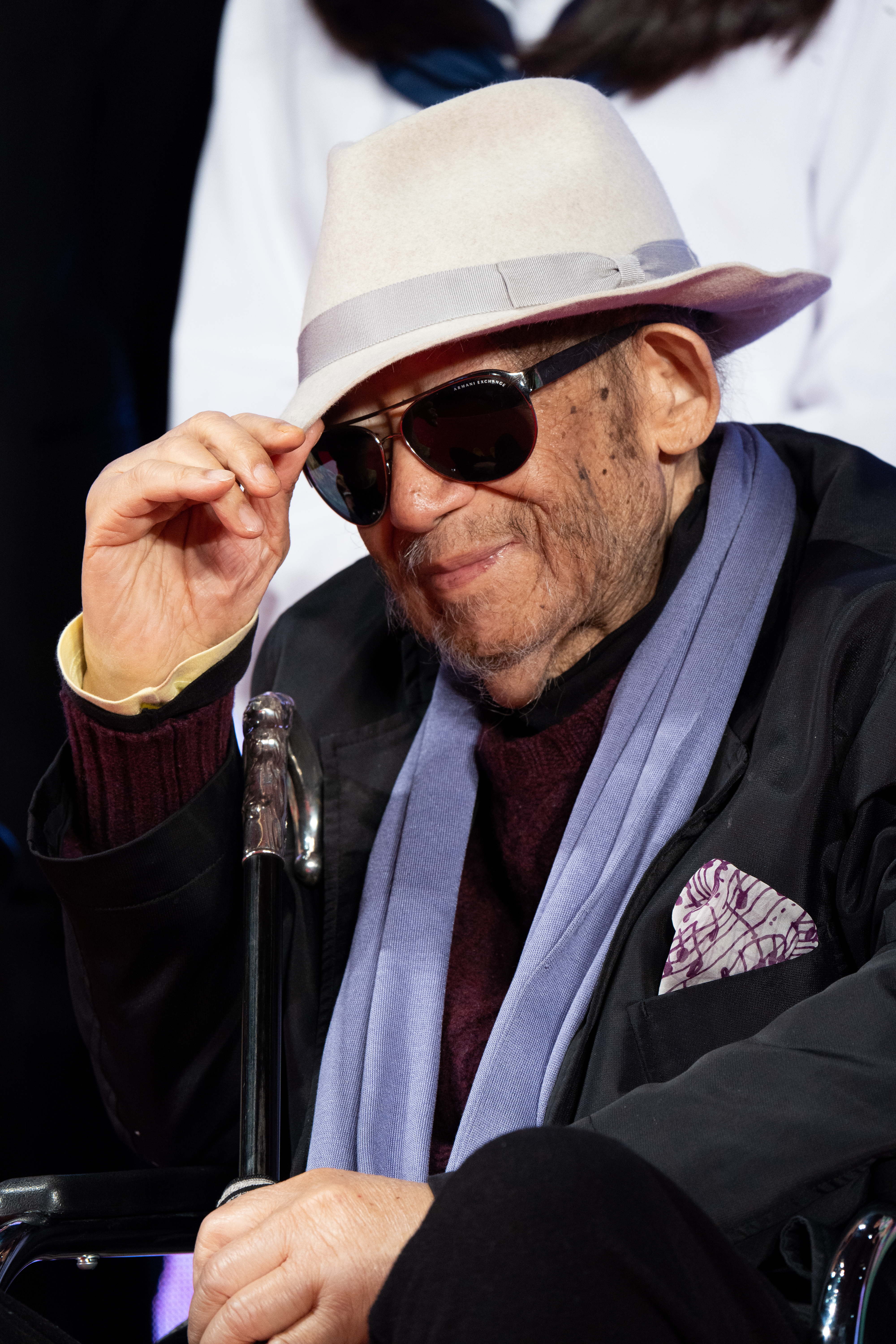 第32回 東京国際映画祭 オープニングセレモニー 大林宣彦 (海辺の映画館―キネマの玉手箱)